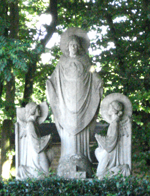 Heilig Hartmonument in Maren